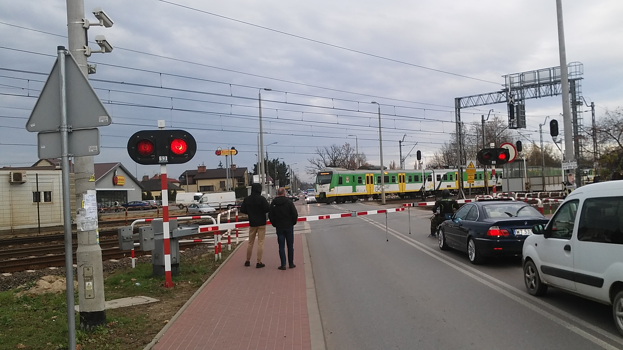 przystanek kolejowy Kobyłka Ossów - przejazd kolejowy od strony ul. ks. J. Poniatowskiego (od południa), na torach pociąg osobowy Kolei Mazowieckich KM 11906 relacji Łochów - Warszawa Wileńska